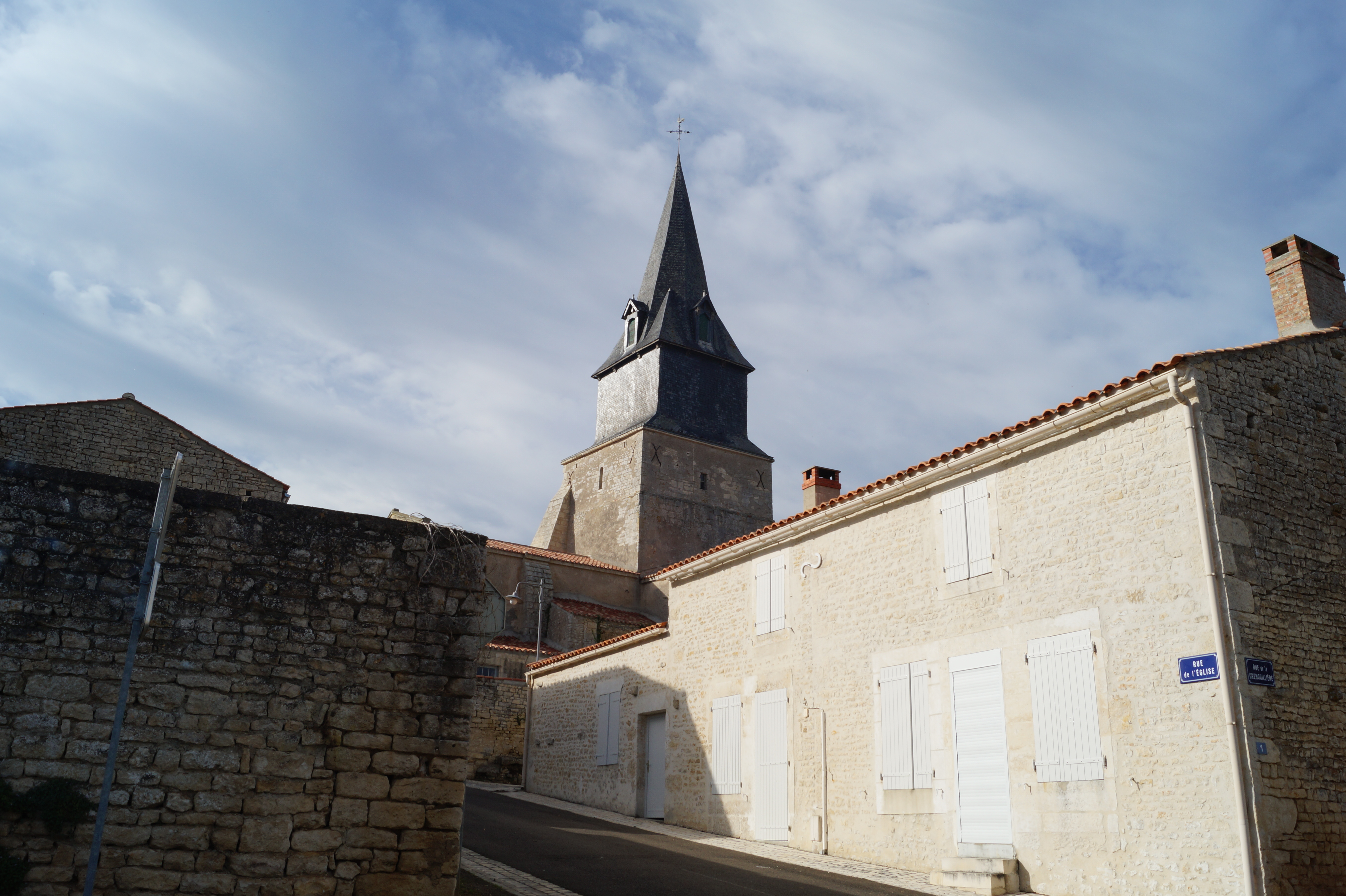 L’église Saint-Romain.